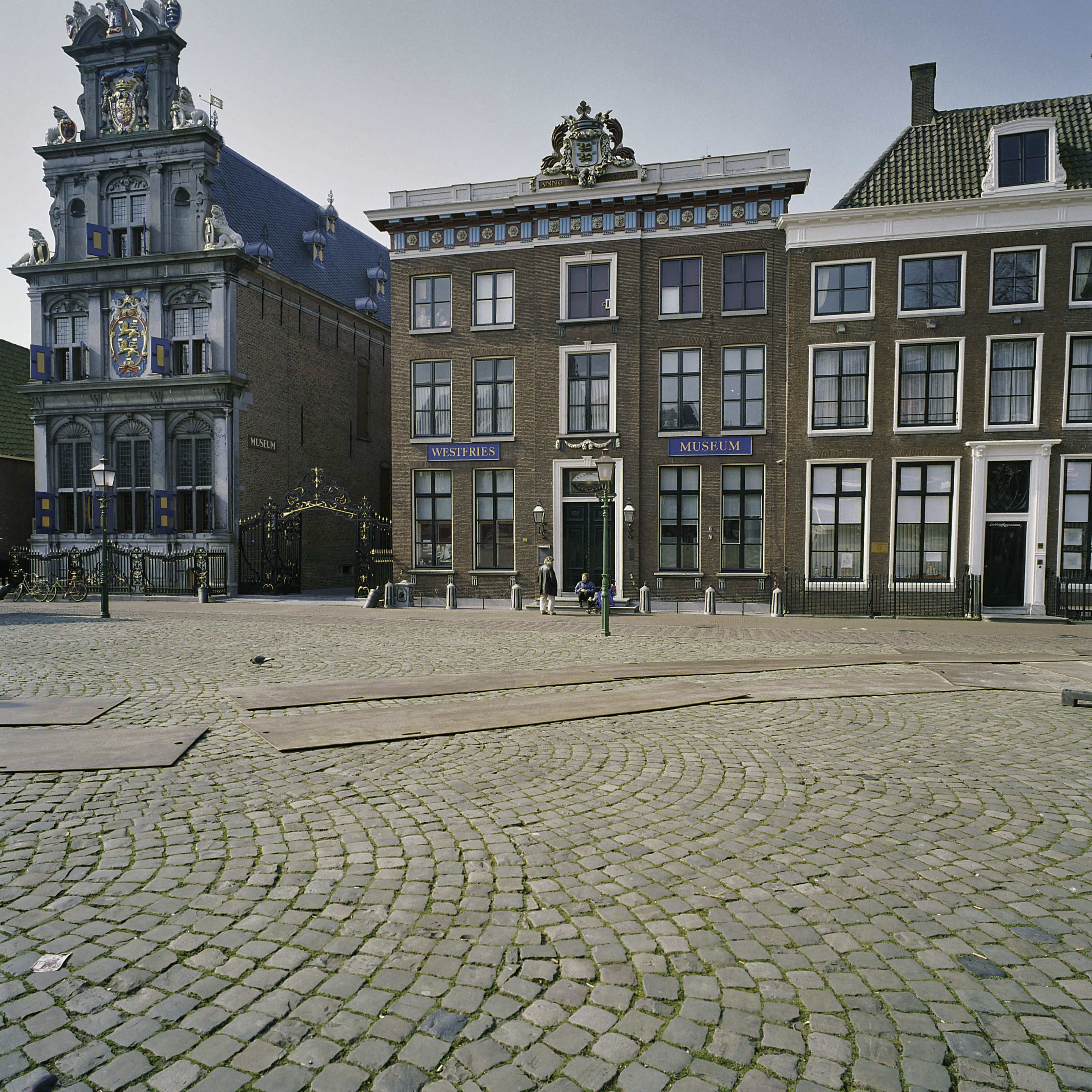 Westfries Museum: Voorgevel met in het opzetstuk het wapen van Friesland (opmerking: Gefotografeerd voor Monumenten In Nederland Noord-Holland)